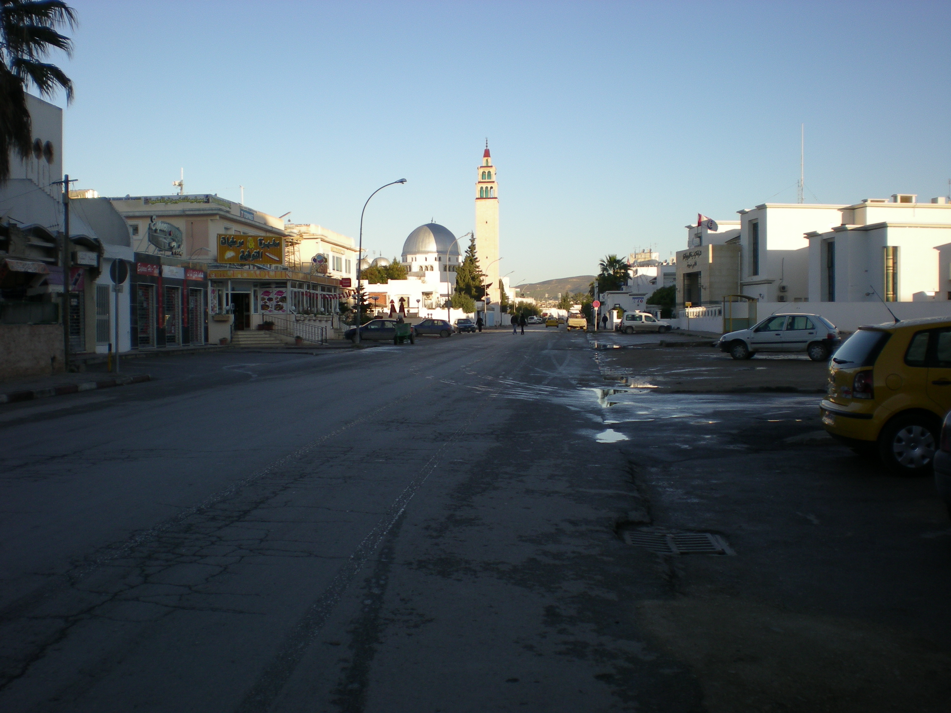 Sprols Manouba un dimanche matin.